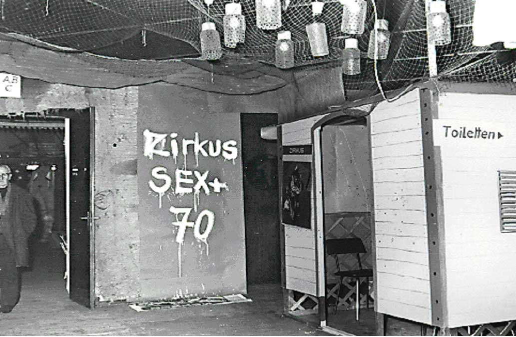 Fasching in Eberswalde